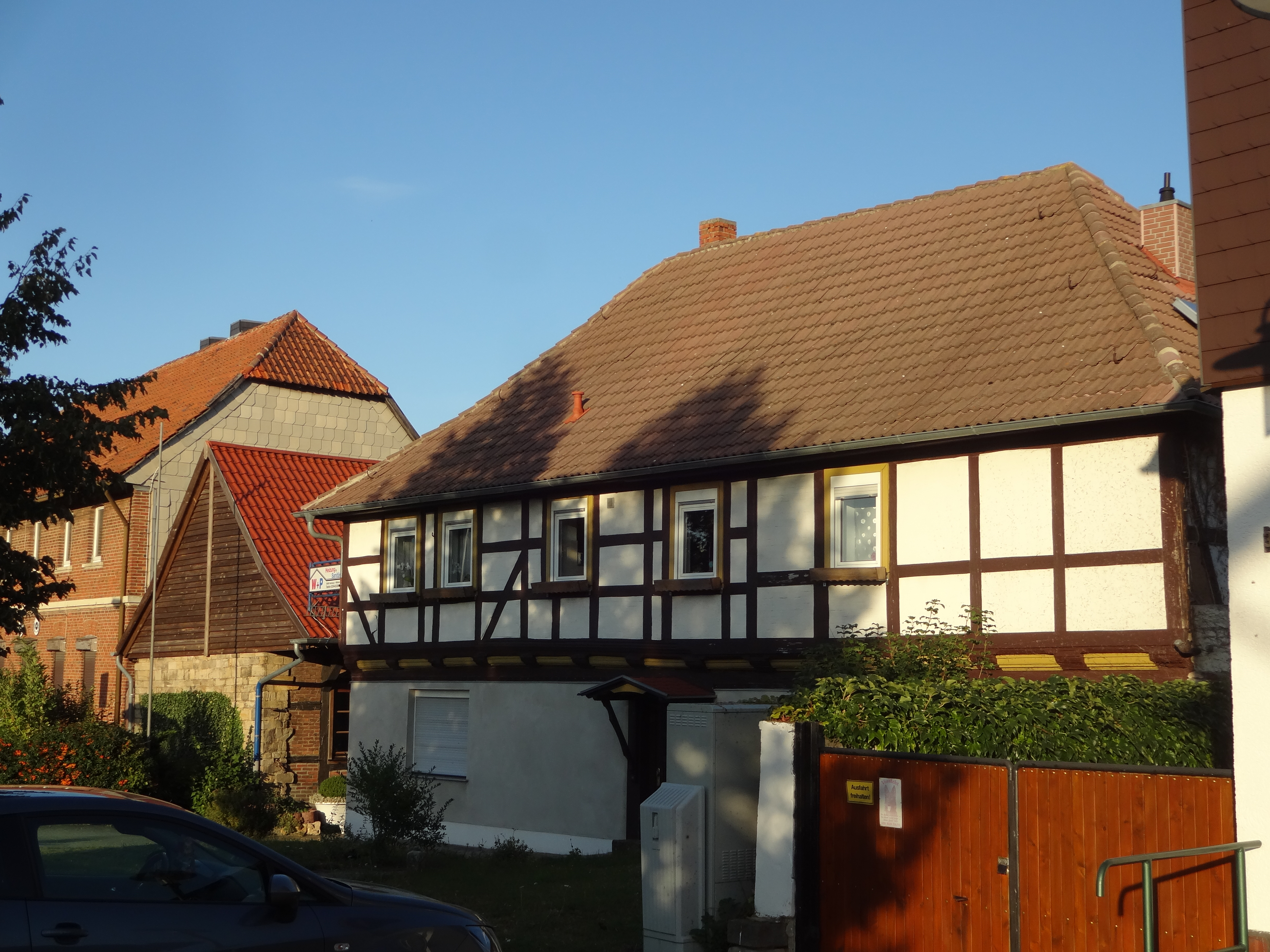 denkmalgeschütztes Wohnhaus in der Wilhelm-Pieck-Straße 34 in Heimburg